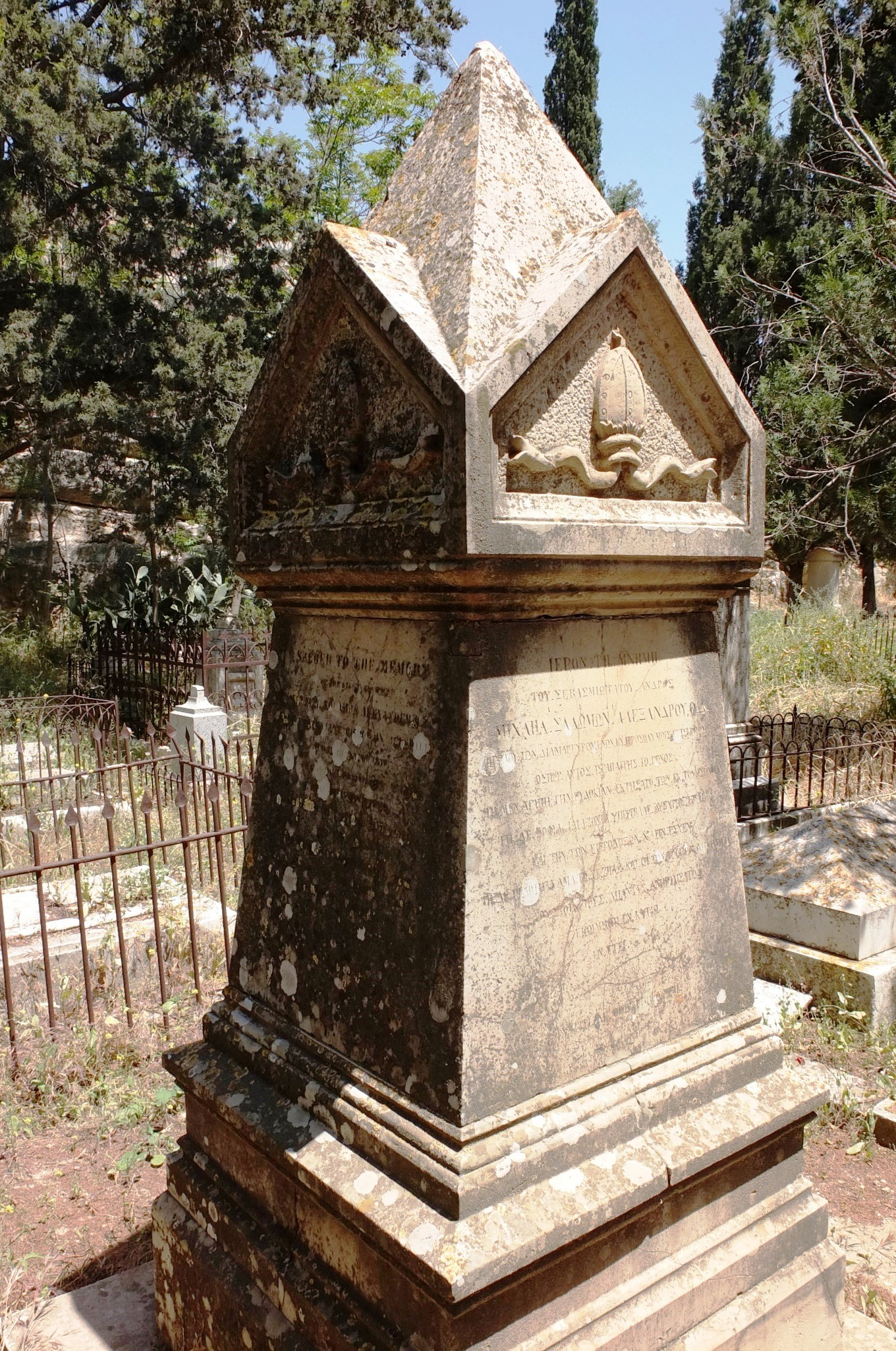 המצבה על קברו של הבישוף אלכסנדר